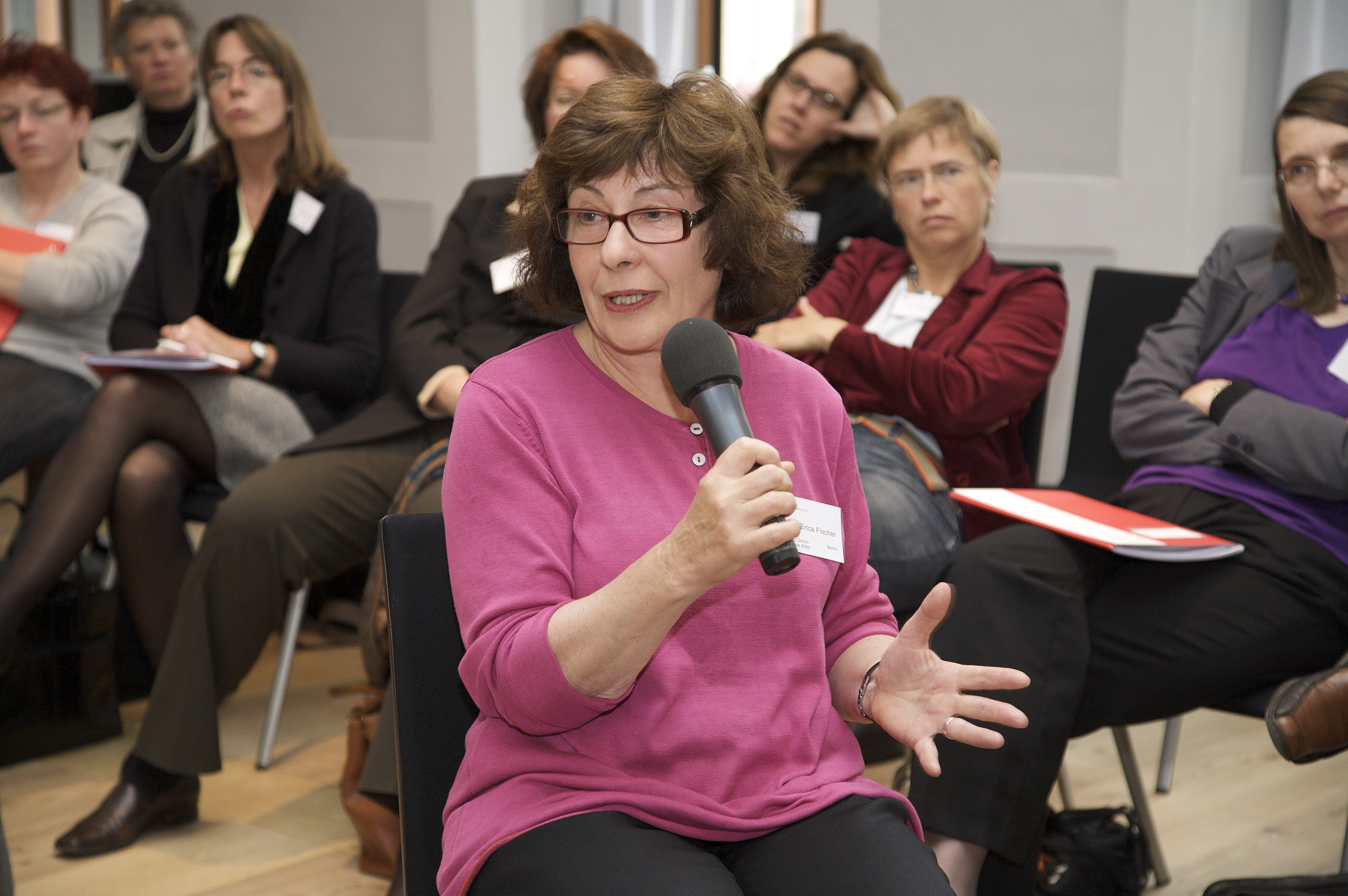 Jahrestagung des Journalistinnenbundes 2009